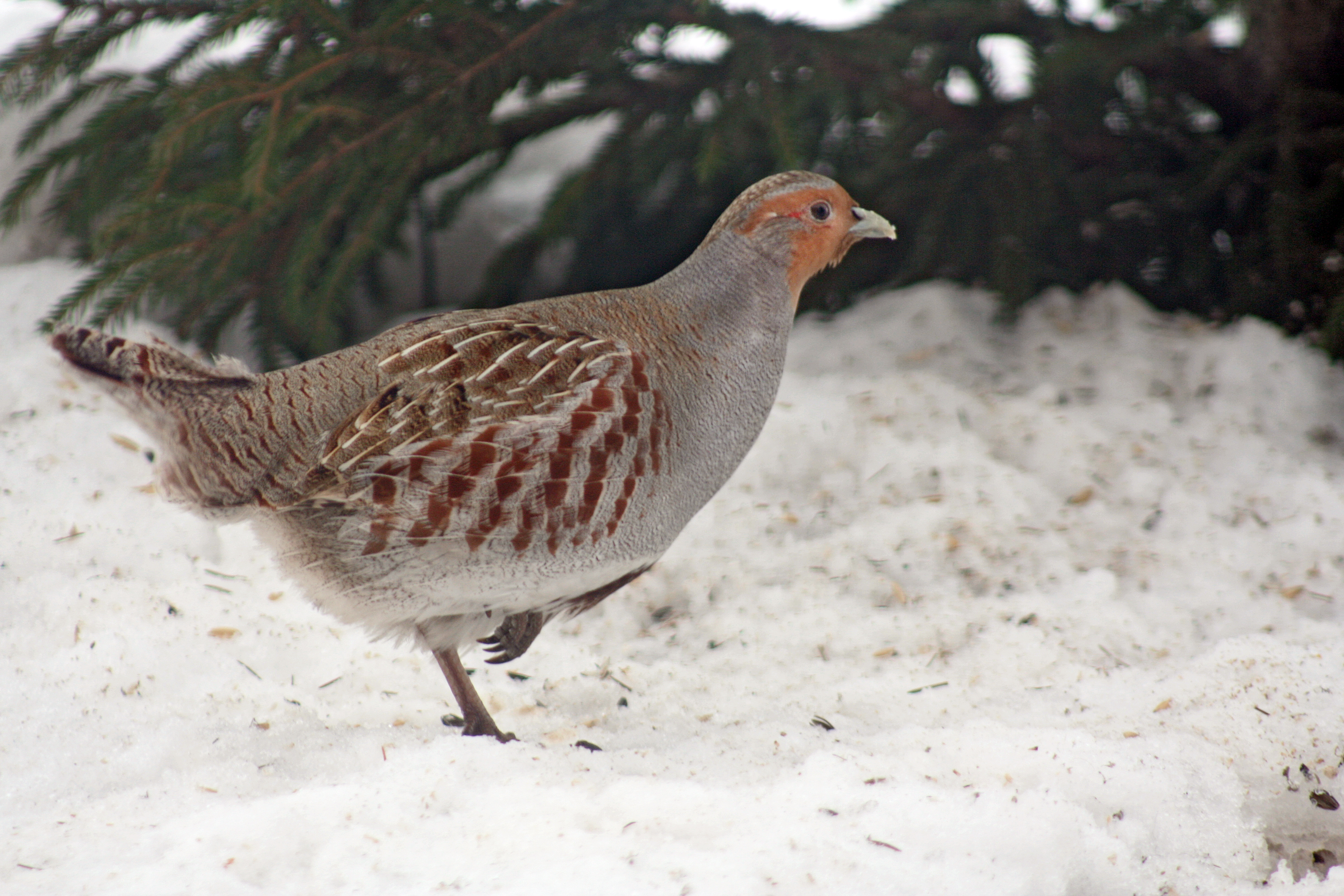 Perdix perdix